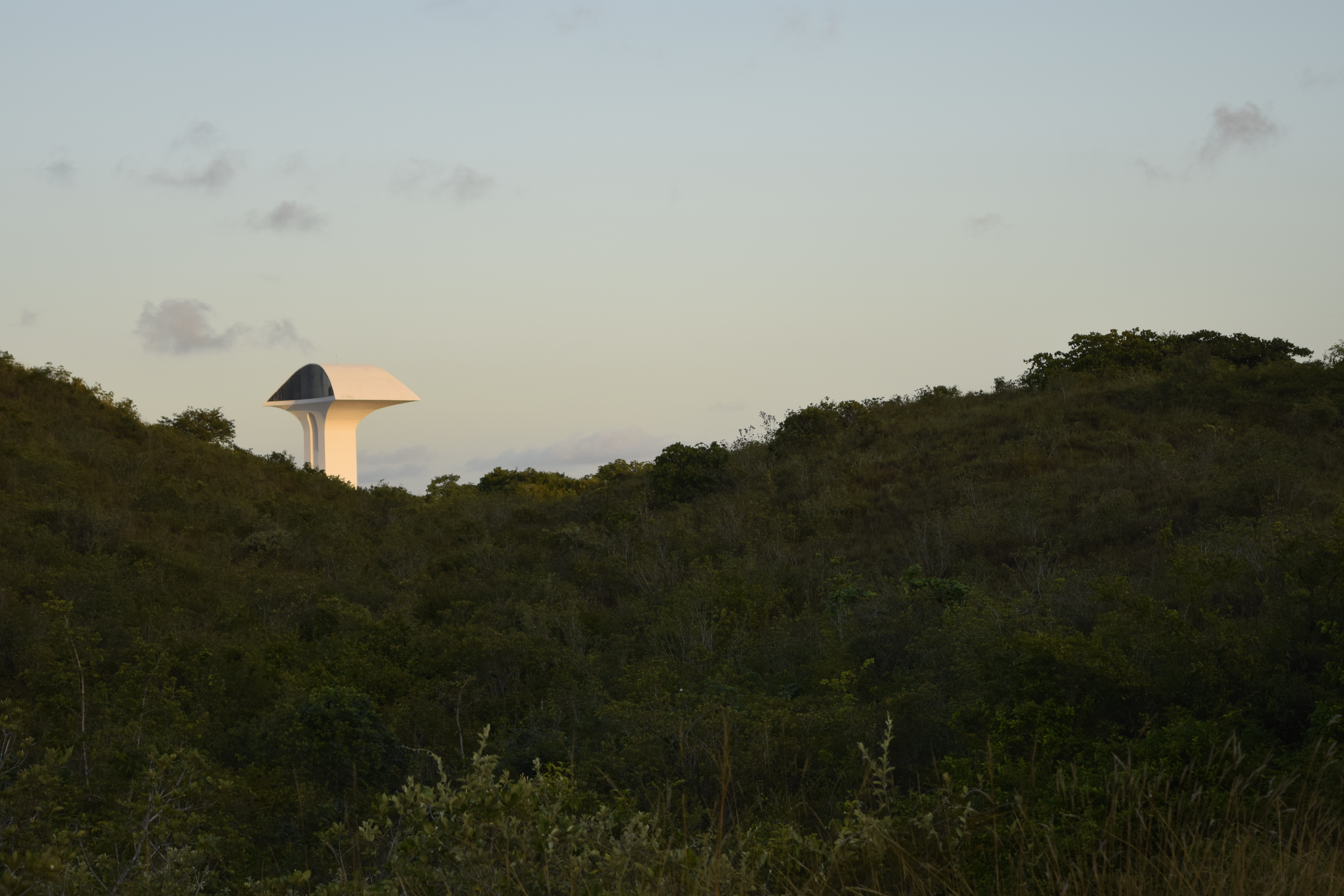 Fotografia feita enfocando a vegetação do Parque da Cidade Dom Nivaldo Monte e o Mirante ao longe.